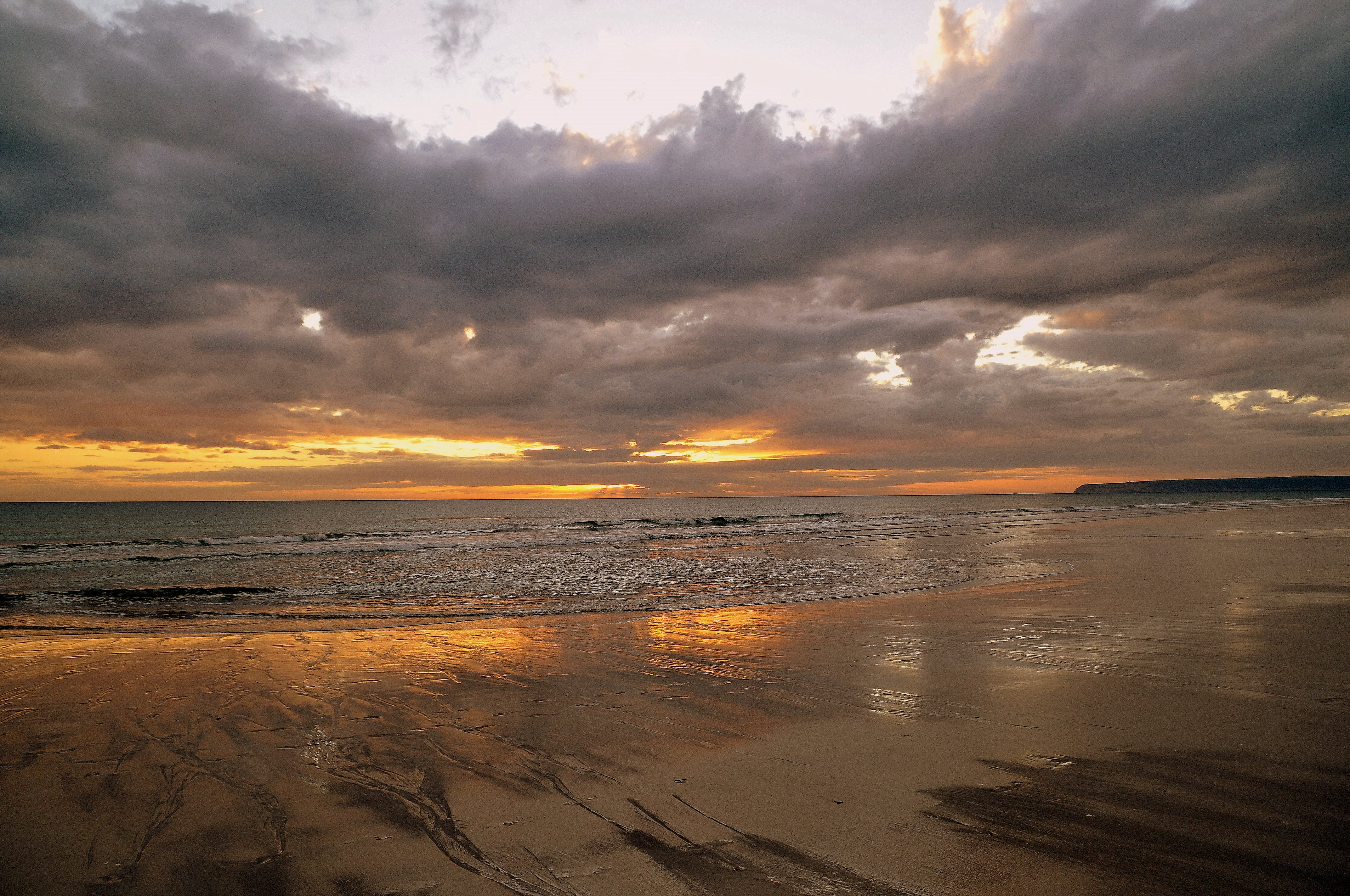 En primer término aparece la playa de Zahara de los Atunes, con marea baja. En la parte media derecha aparece la llamada "Breña de Barbate".